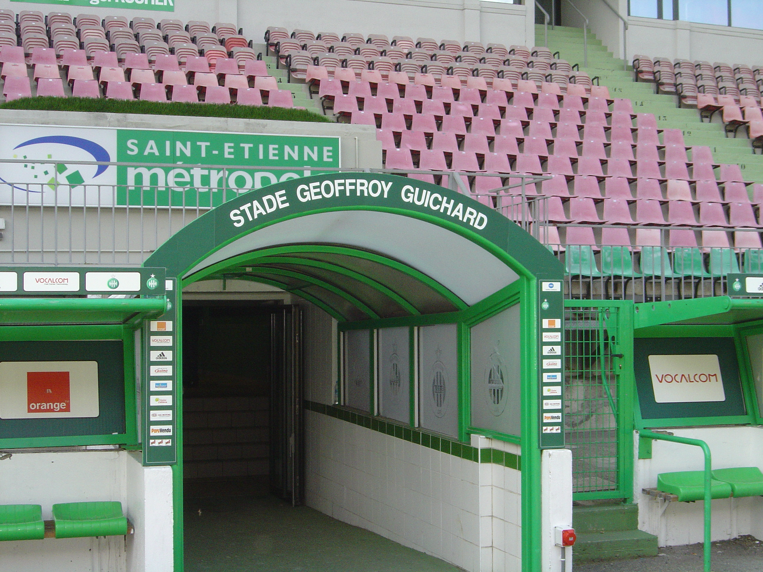 Sortie du Tunnel des joueurs du Stade Geoffroy-Guichard vu du terrain. Photo prise par Mickaël Roure (Alias Altrensa pour Wikipédia) Licensing Catégorie:Image de l'ASSE